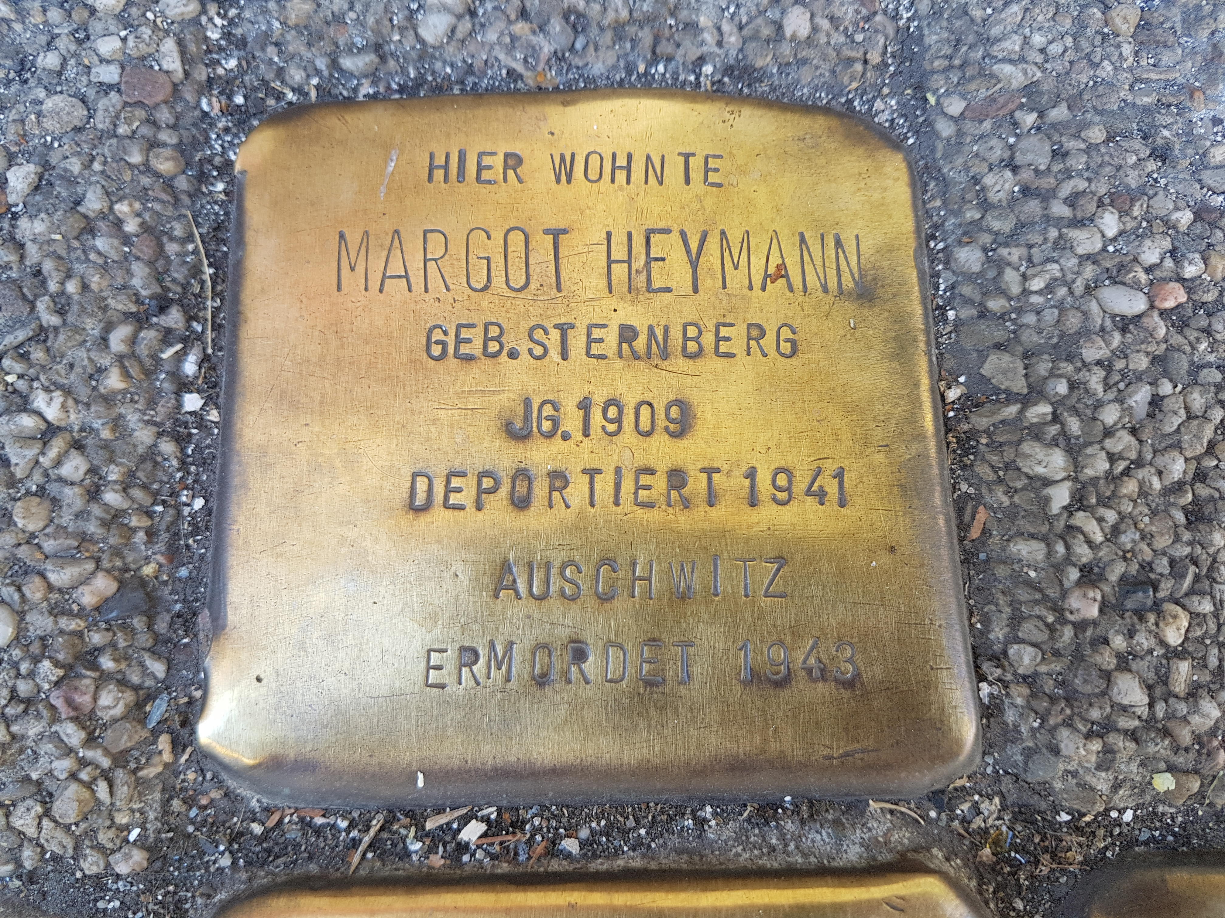 Stolperstein Duisburg Margot Heymann